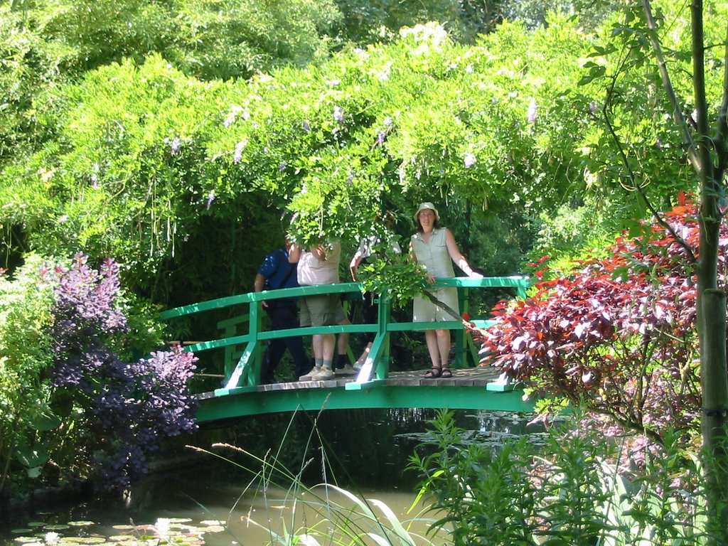 Bridge in Monet's gardens in Giverny